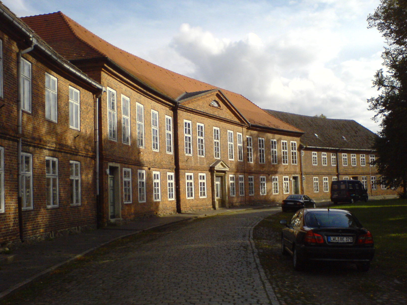 Prinzenpalais, Ludwiglust